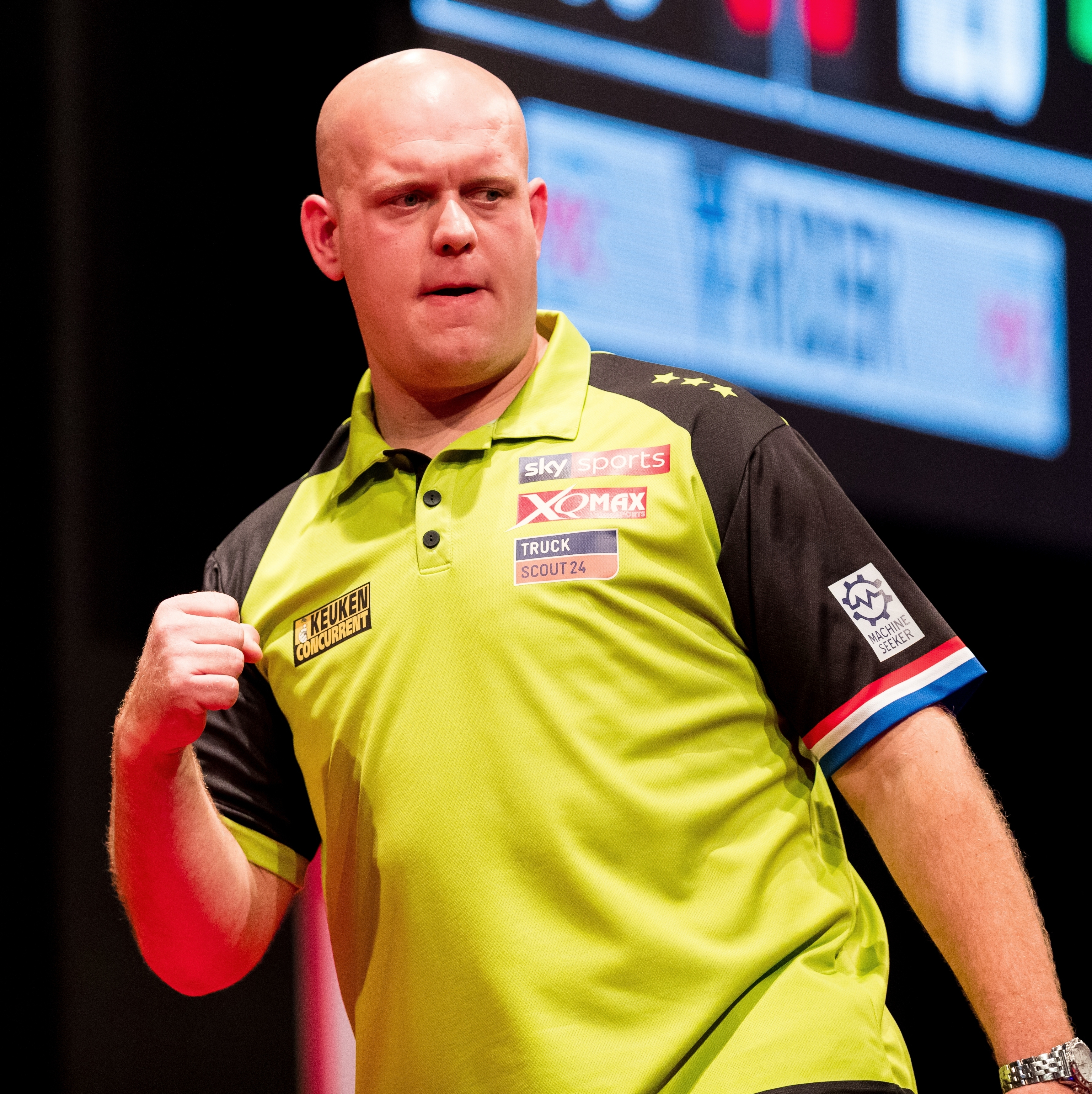 Michael van Gerwen 6:5 Krzysztof Ratajski during PDC Europe Darts Matchplay at Maimarkthalle, Mannheim, Baden-Württemberg, Germany on 2019-09-08, Photo: Sven Mandel